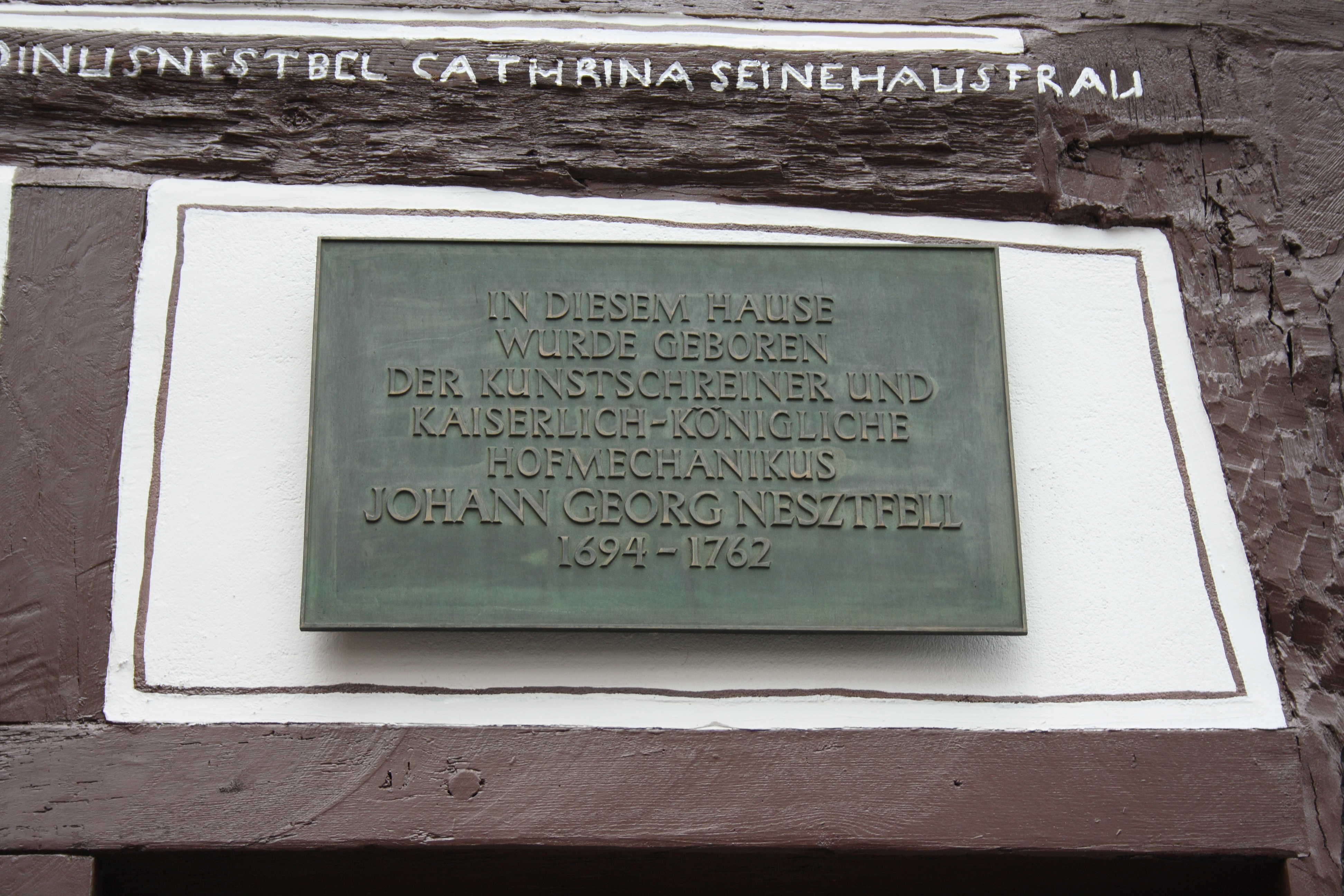 Haus Untergasse 32 in Alsfeld im Vogelsbergkreis (Hessen), Gedenktafel für Johann Georg Neßtfell